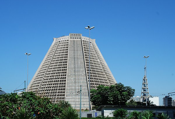 Cathédrale Sao Sebastiao de Rio de Janeiro